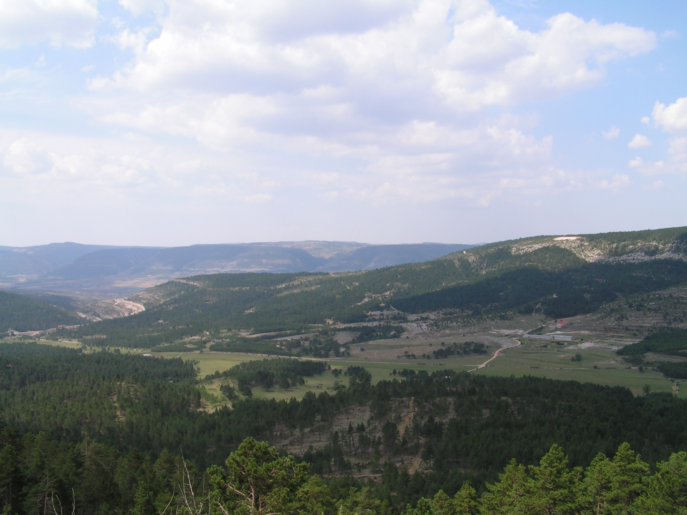 Vista Maestrazgo (Fortanete, Teruel, Aragón)